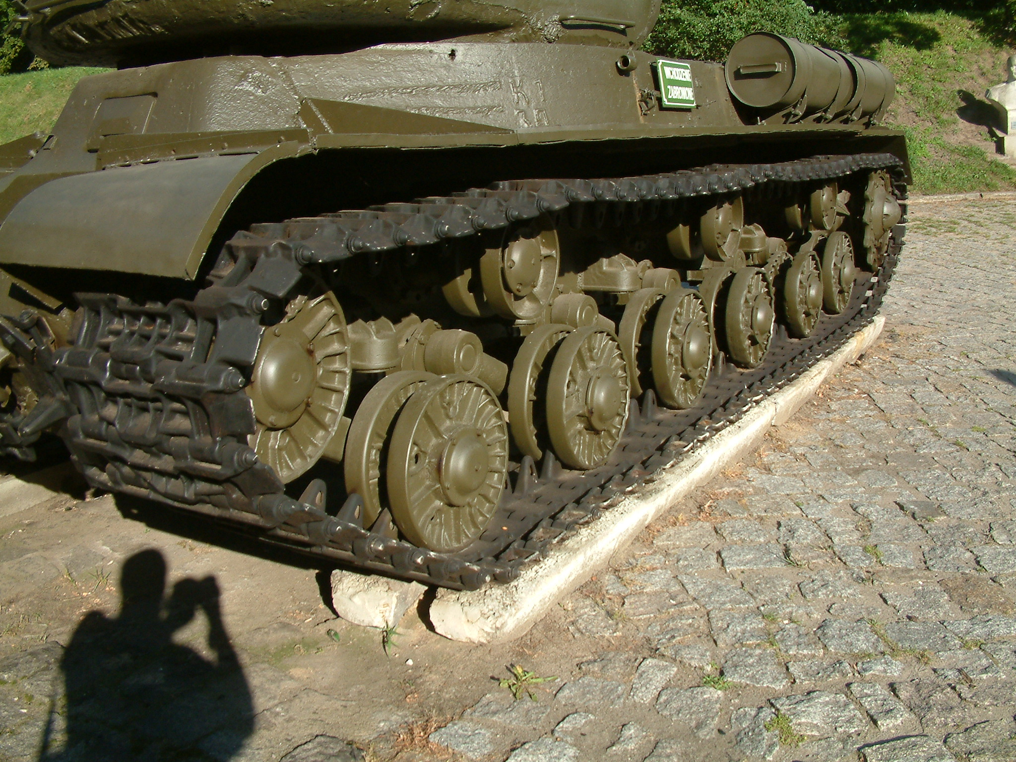 IS-2 model 1943, Fort Winiary, Poznań